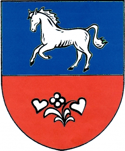 znak, Kuklík, okres Žďár nad Sázavou